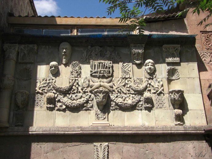 Кировакан, дом Варпета Меграба